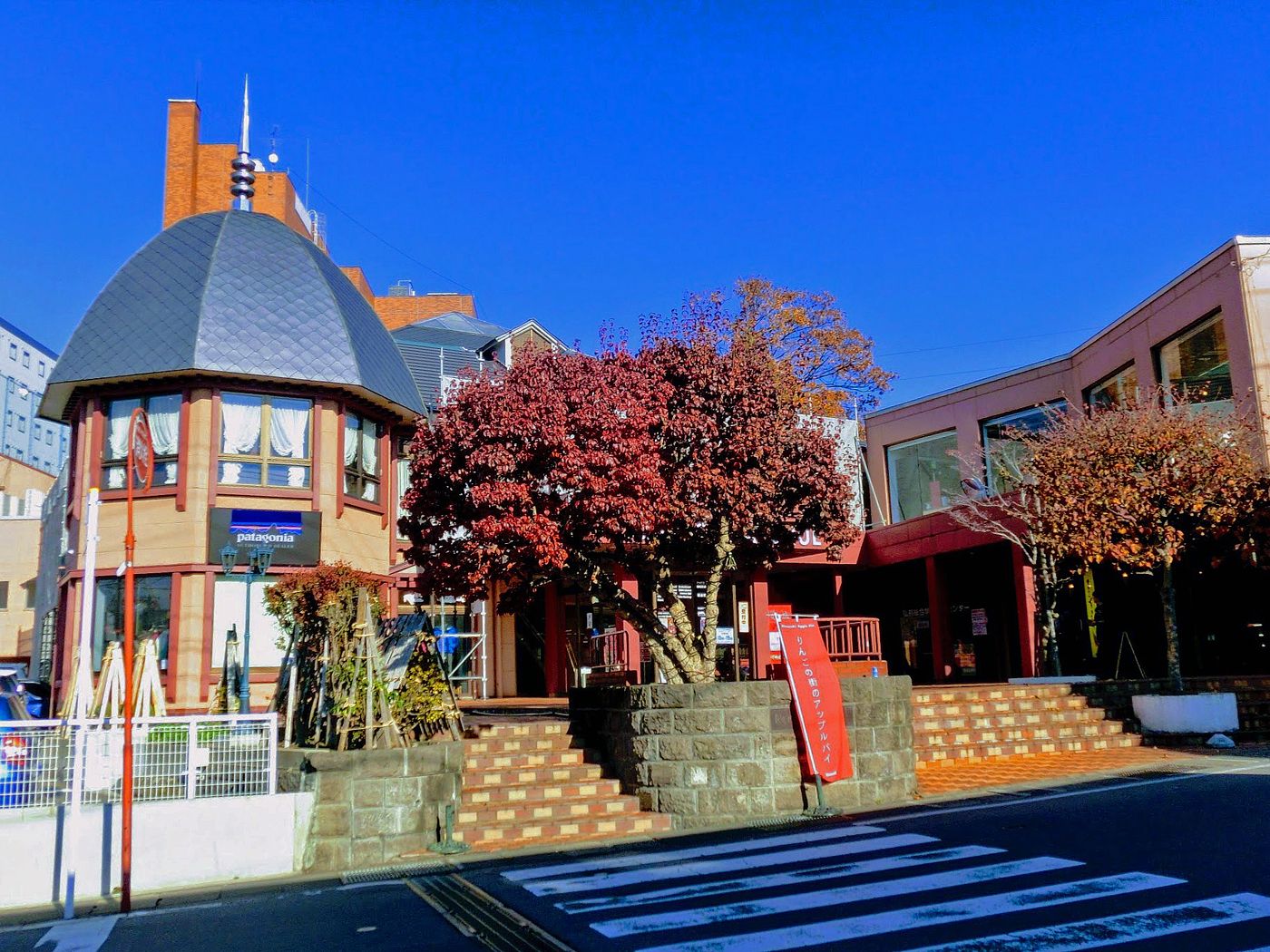 青森県弘前市土手町にあるファッションビル「ルネスアベニュー」の外観。